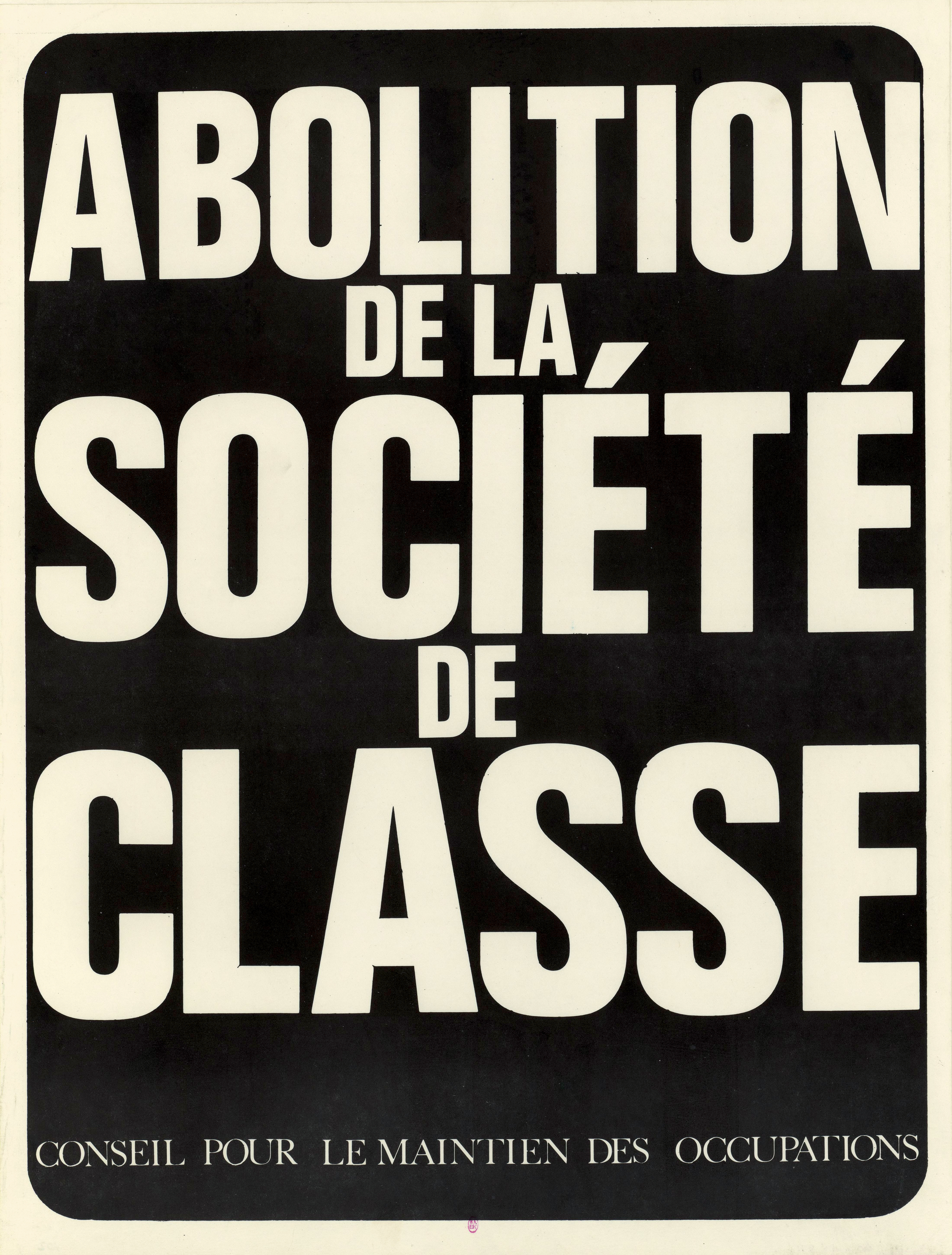 Abolition de la société de classe. Conseil pour le maintien des occupations. Affiche Mai 1968.